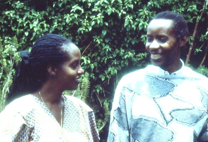 Cyprien et Daphrose Rugamba en 1992, dans leur jardin à Kigali (Rwanda).